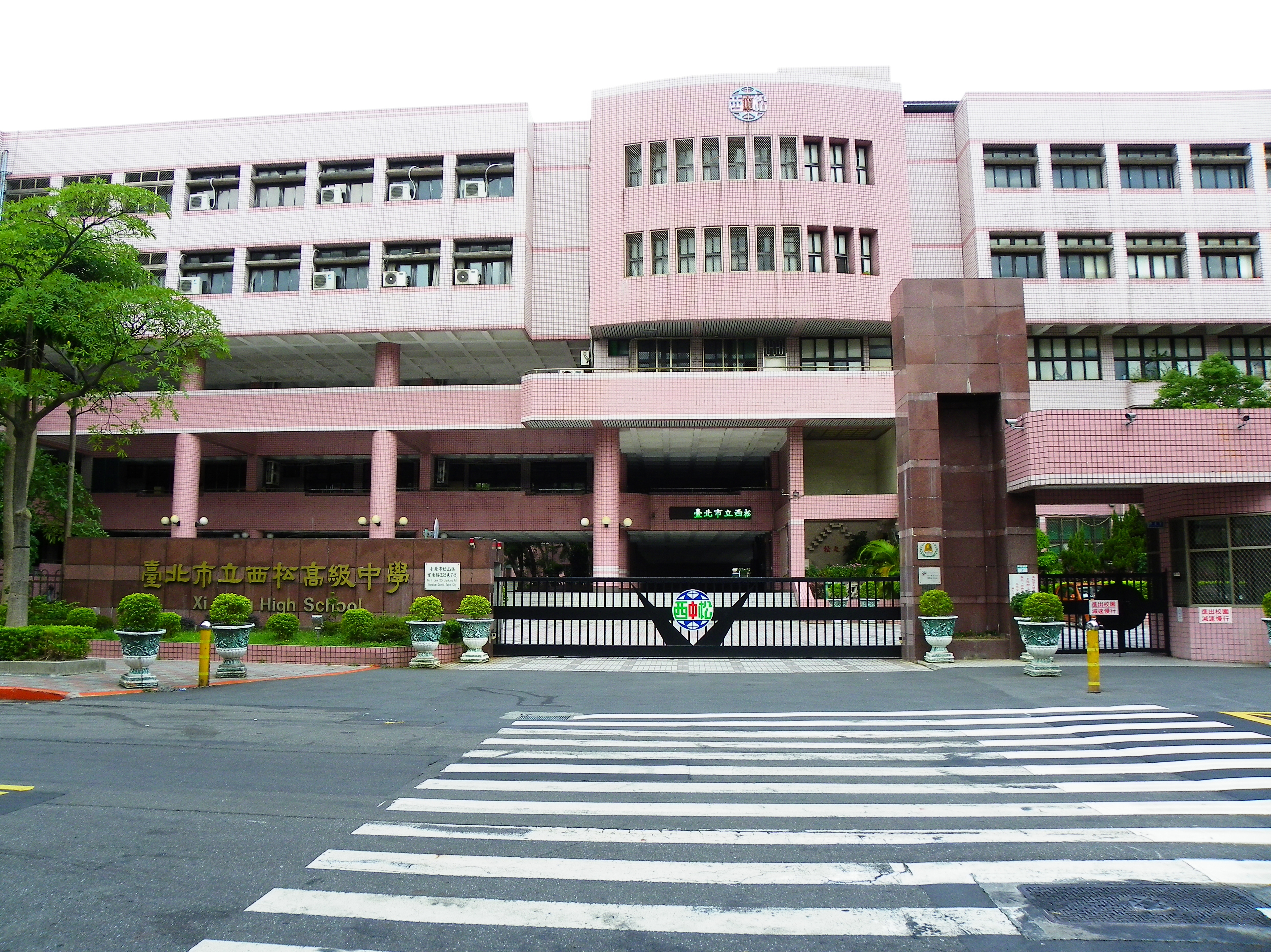 臺北市松山區西松高中正門。